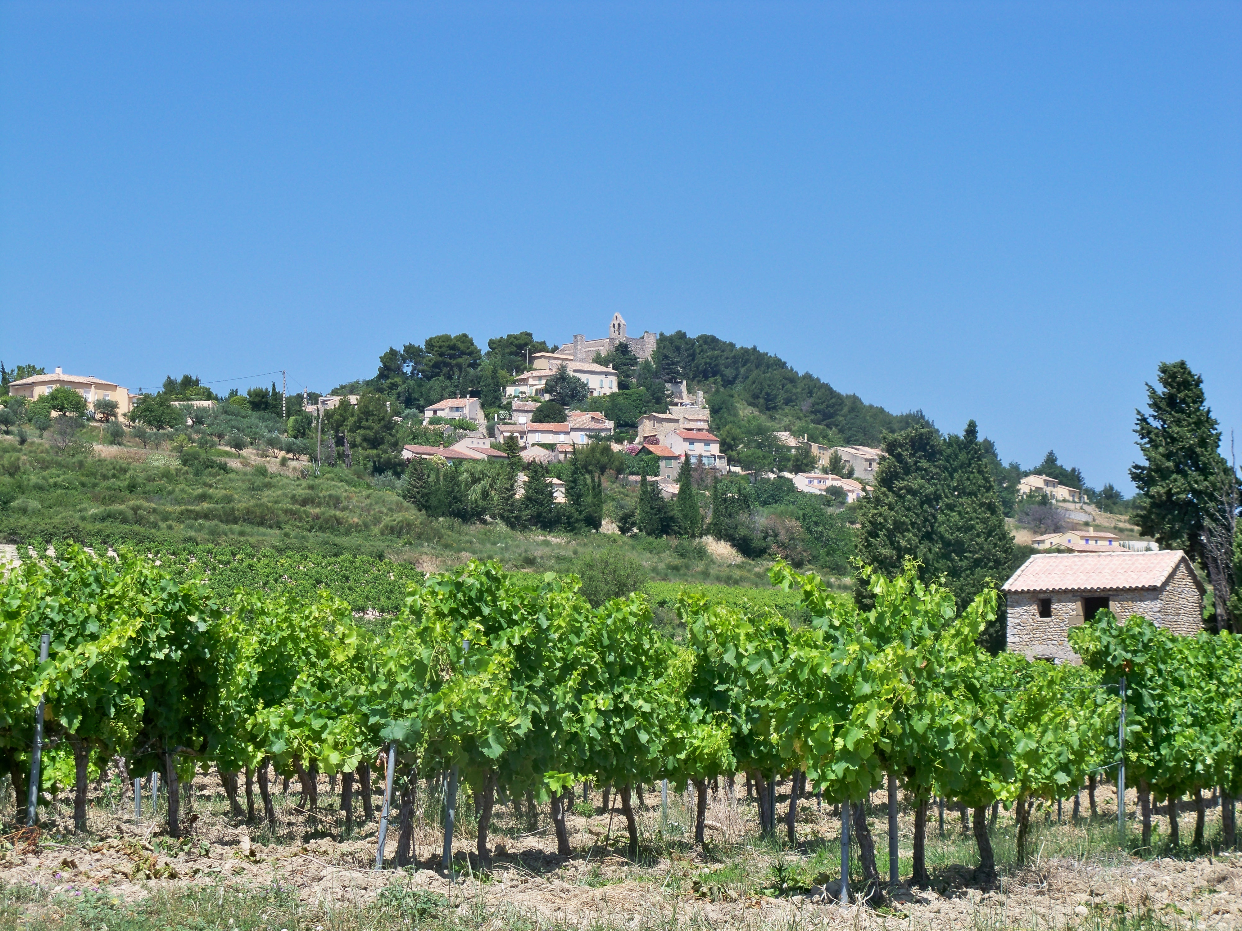 Vue sur le village de Rasteau (Vaucluse) et son vignoble